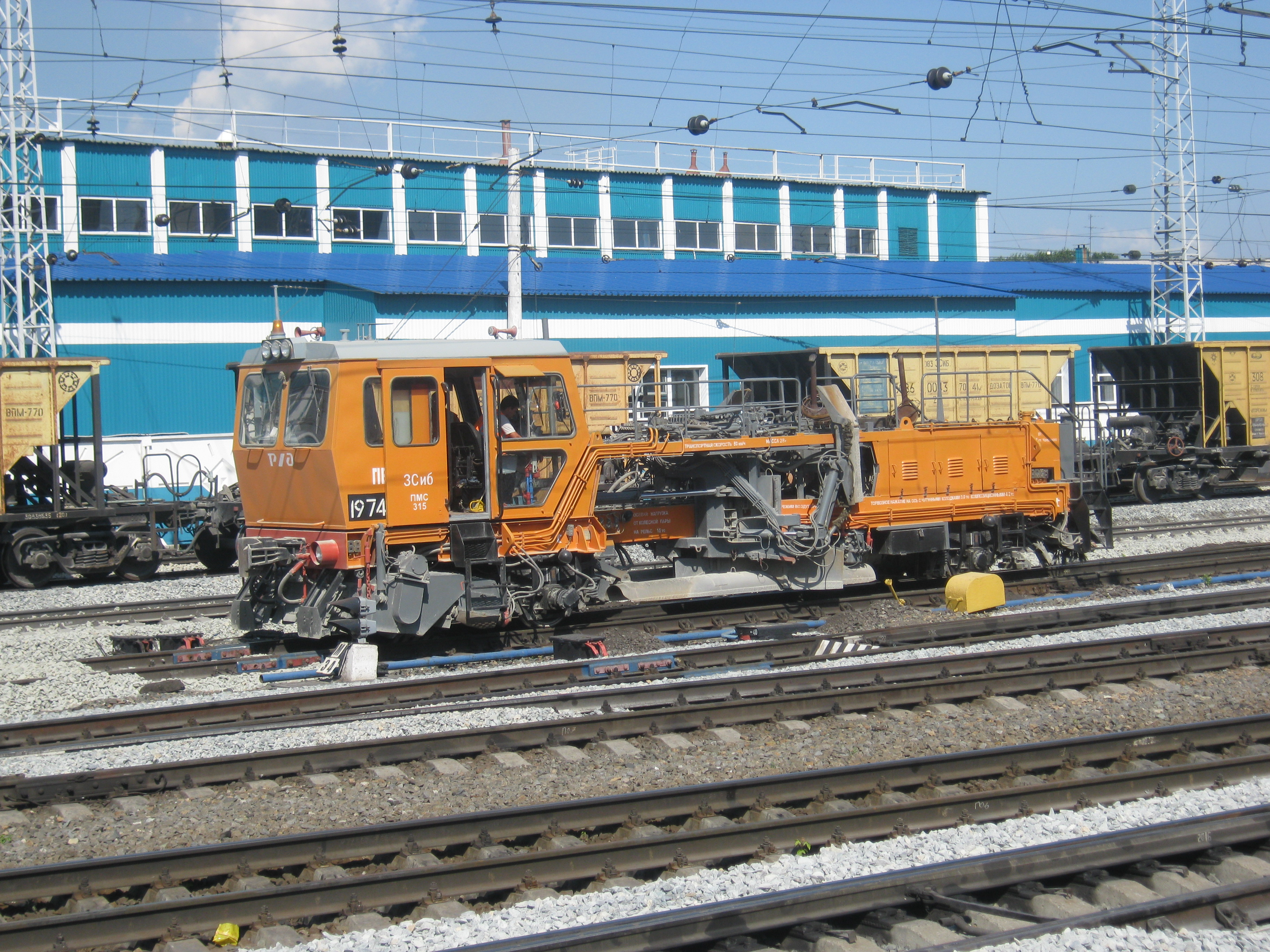 Планировщик балласта ПБ-01, Калужского завода путевых машин и гидроприводов. Фотография сделана в 2013 году на ст.Новокузнецк, Западно-Сибирской железной дороги, цифровой фотокамерой Canon PowerShot A480 с разрешением 10 Мпкс.